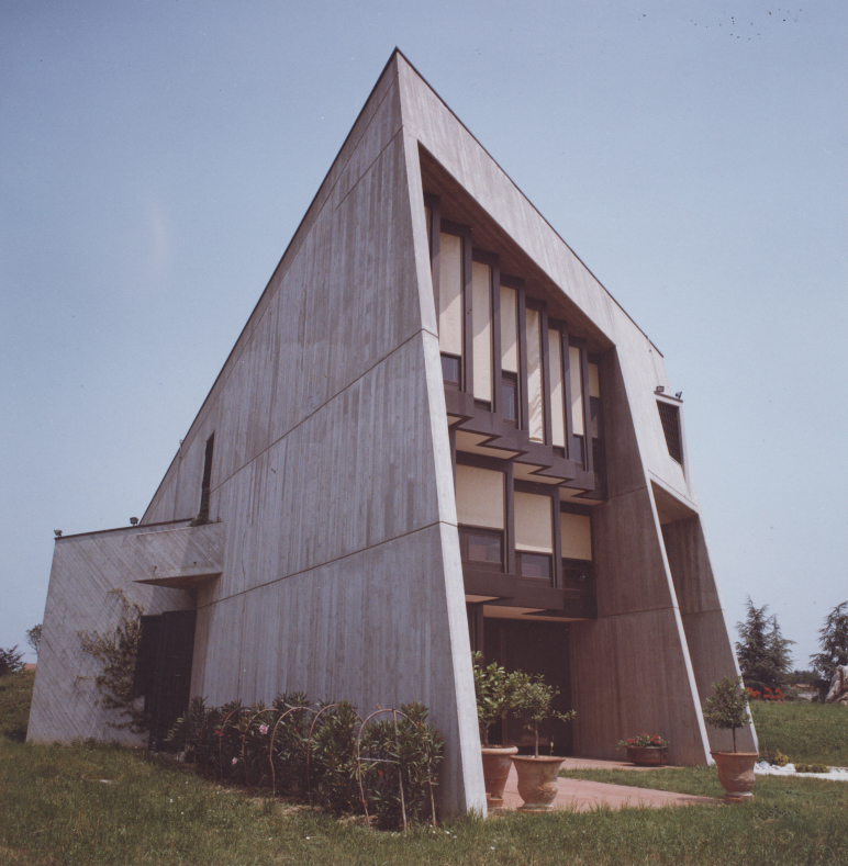 Casa Emme, Ravenna, prospetto frontale